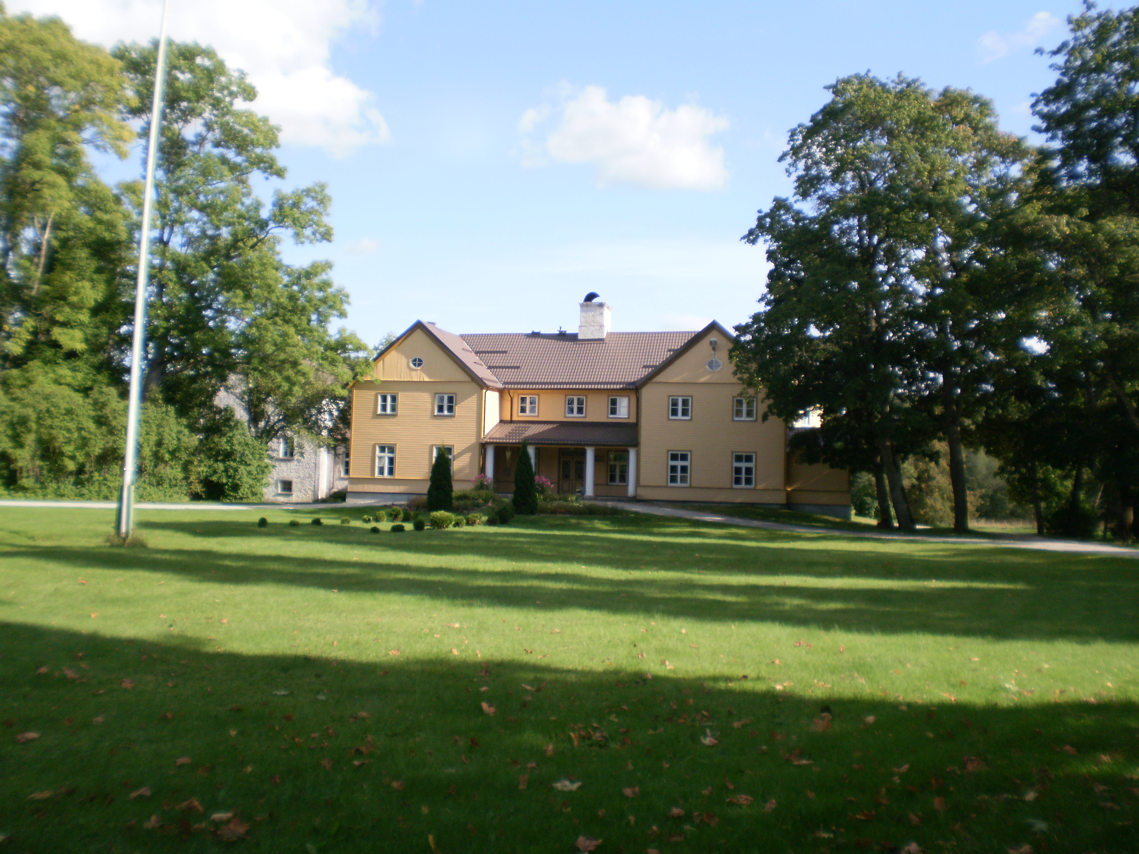 Virumaa Viru-Jaagupi kihelkonna Põlula mõisa härrastemaja